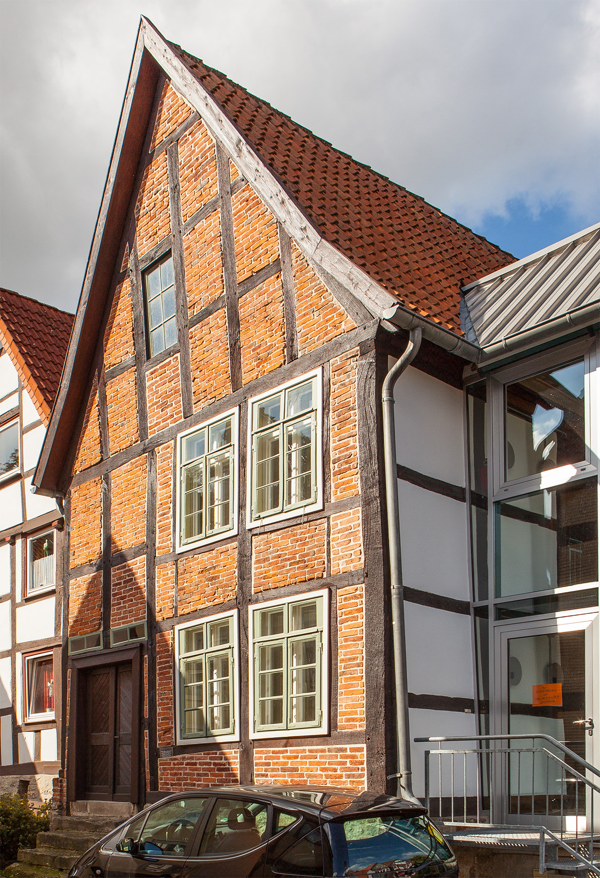 Blomberg, Ehem. Synagoge, Siebenbürgen 1aThis is a photograph of an architectural monument.